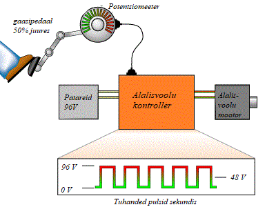 Lihtne alalisvoolu kontroller, mis on ühendatud patareidega ja alalisvoolumootoriga.